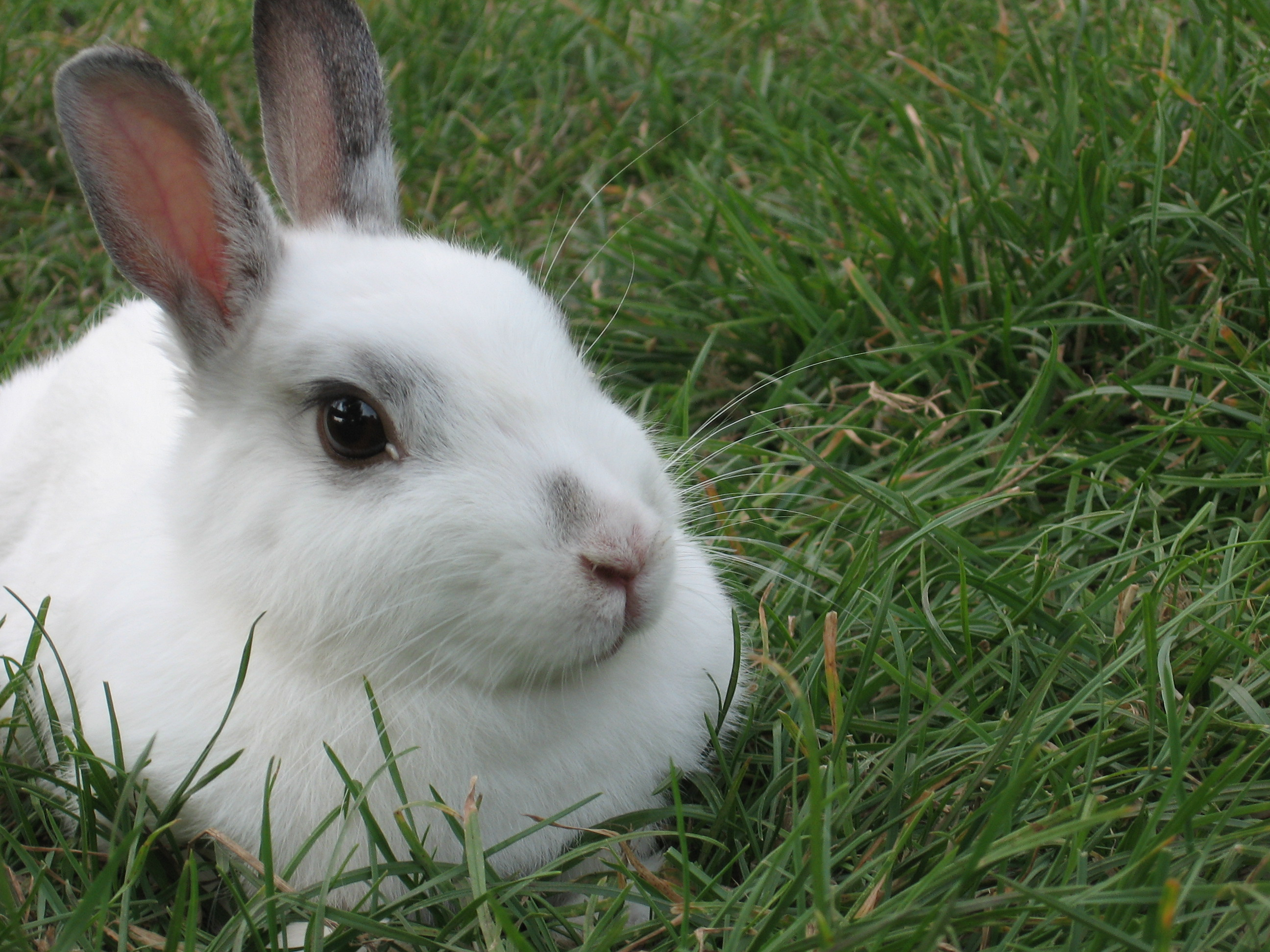 Da's mijn dooie konijn, nou jah hier leefde ie nog :D